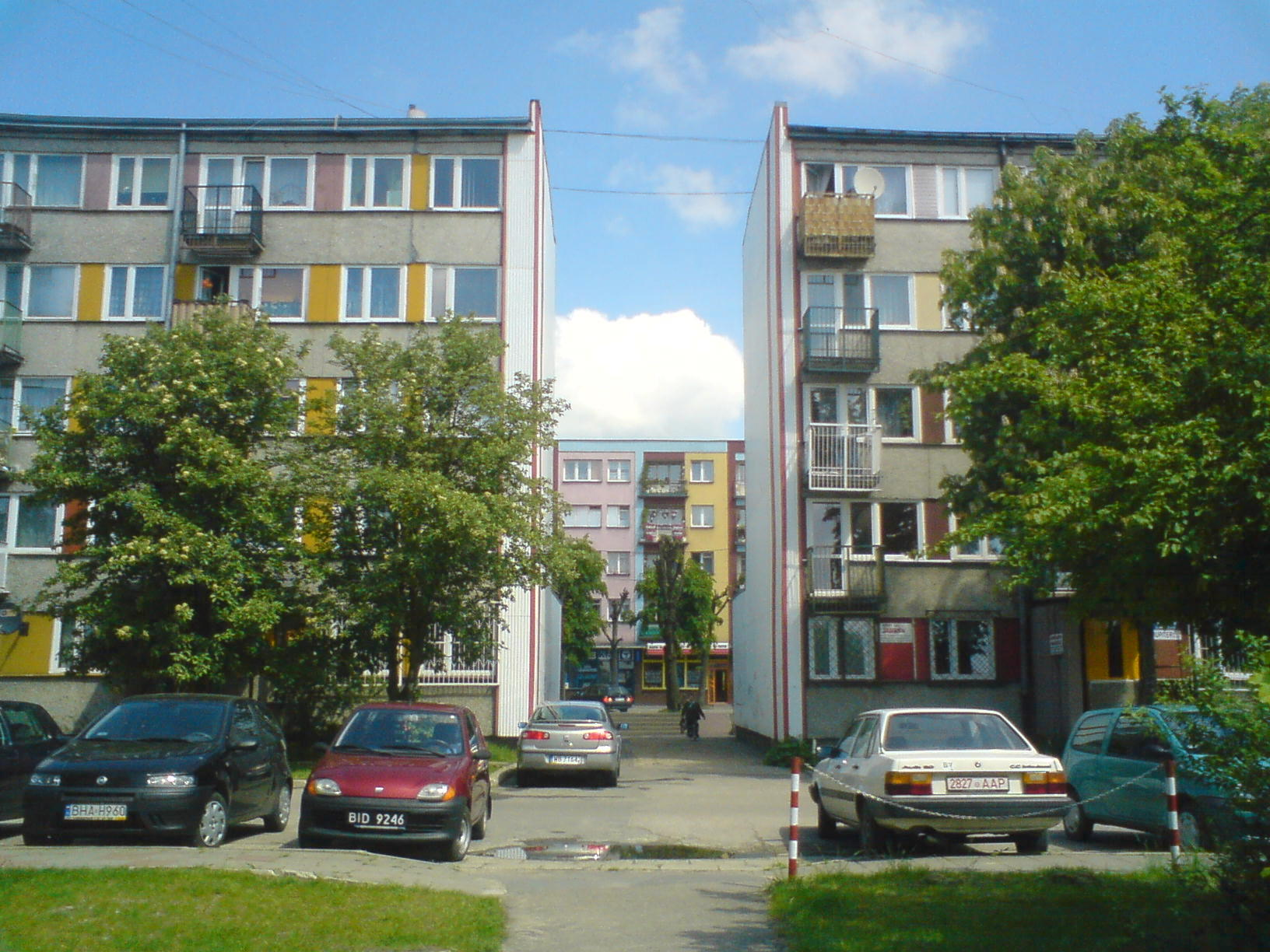 Osiedle Centrum w Hajnówce